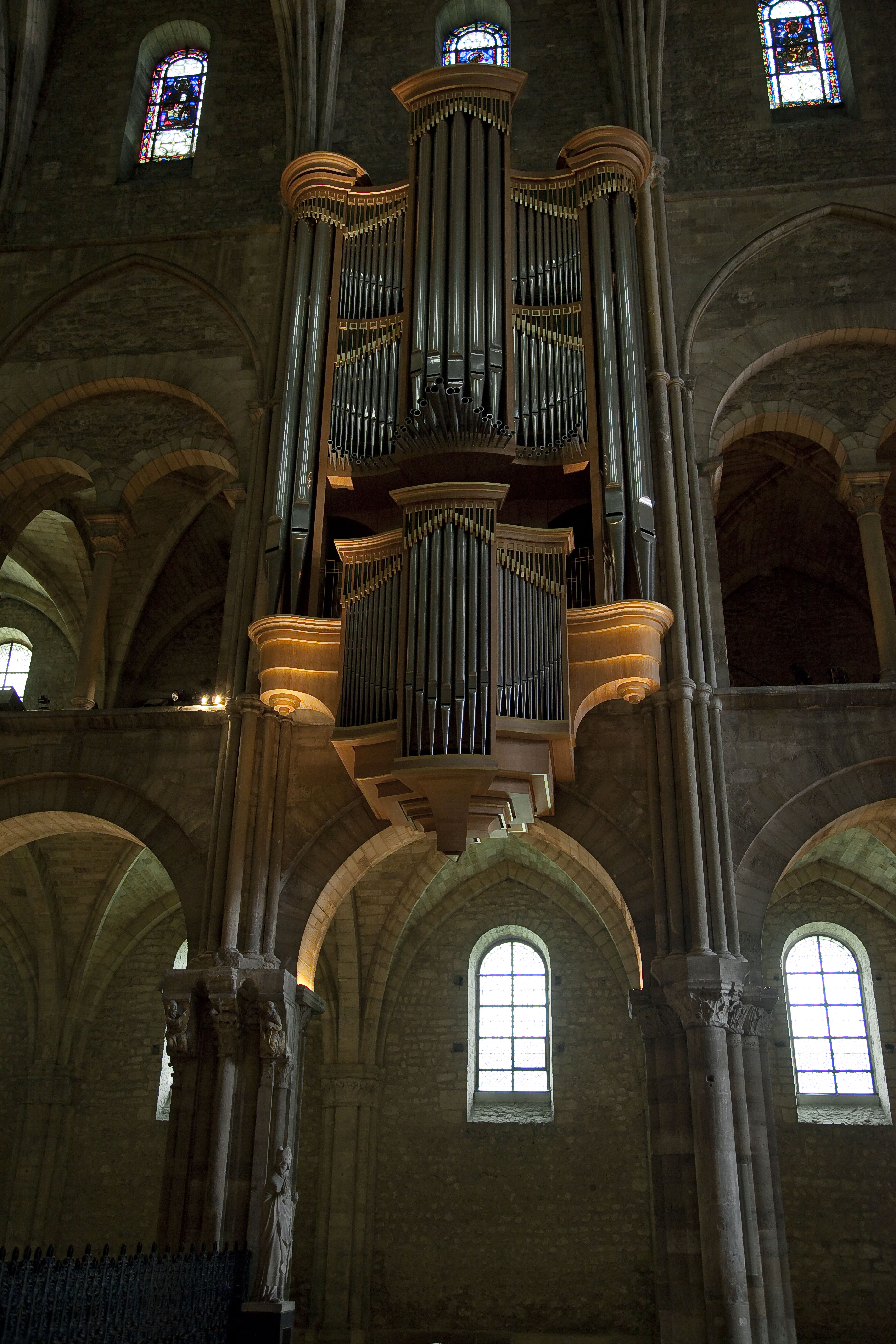 Kirche Saint-Remi (Reims), Orgel .